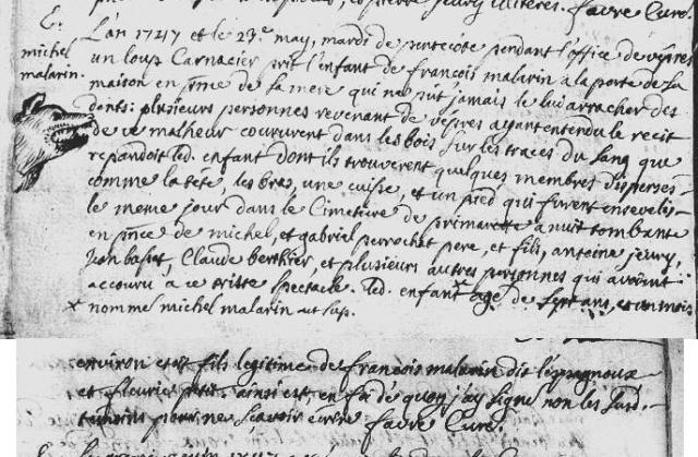 L'an 1747 et le 23e mai, mardi de pentecôte, pendant l'office de vêpres, un loup carnassier prit l'enfant de François Malarin à la porte la maison, en présence de sa mère, qui ne put jamais le lui arracher des dents. Plusieurs personnes revenant de vêpres ayant entendu le récit de ce malheur coururent dans les bois, sur les traces de sang que répandit led[it] enfant, dont ils trouvèrent quelques membres dispersés, comme la tête, les bras, une cuisse et un pied, qui furent ensevelis en présence de Michel et Gabriel Perrochat, père et fils, Antoine Jeury, Jean Bassat, Claude Berthier et plusieurs autres personnes qui avaient accouru à ce triste spectacle. Led[it] enfant* âgé de sept ans et un mois... nommé Michel Malarin [act sup ?] ... environ et fils légitime de François Malarin, dit l'espagnoux, et Fleurice Petit. Ainsi et en foi de quoi j'ai signé, non les susd[its] témoins pour ne savoir écrire. Favre Curé.